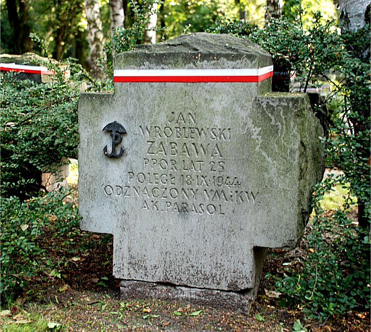 grób na Powązkach Wojskowych